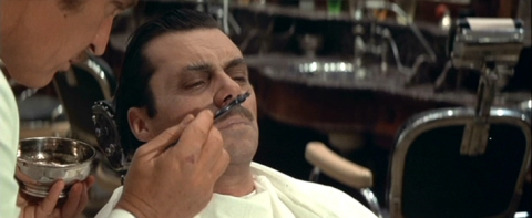 Képkocka a „Halál Velencében” című filmből